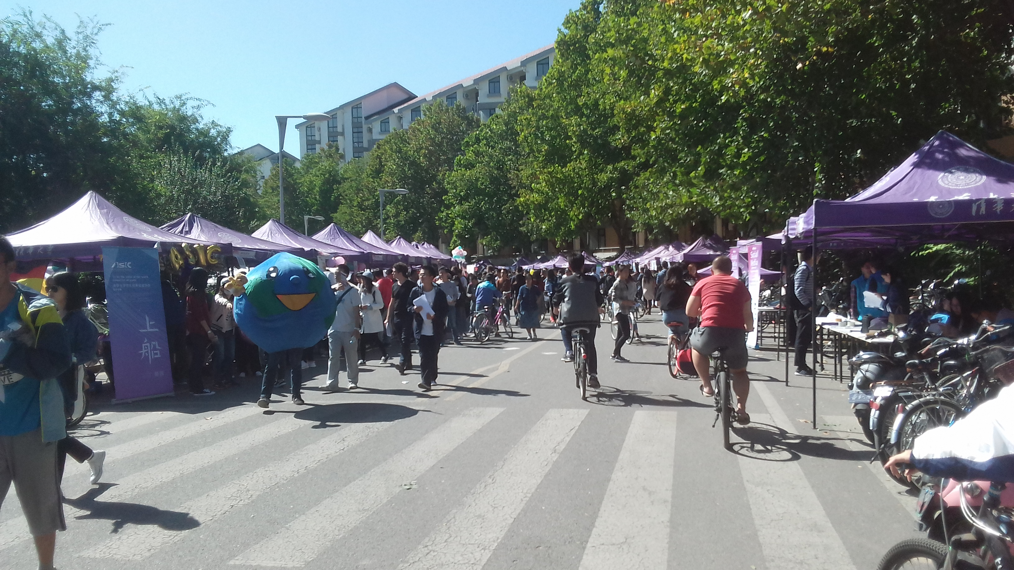 紫荊公寓前百團大戰